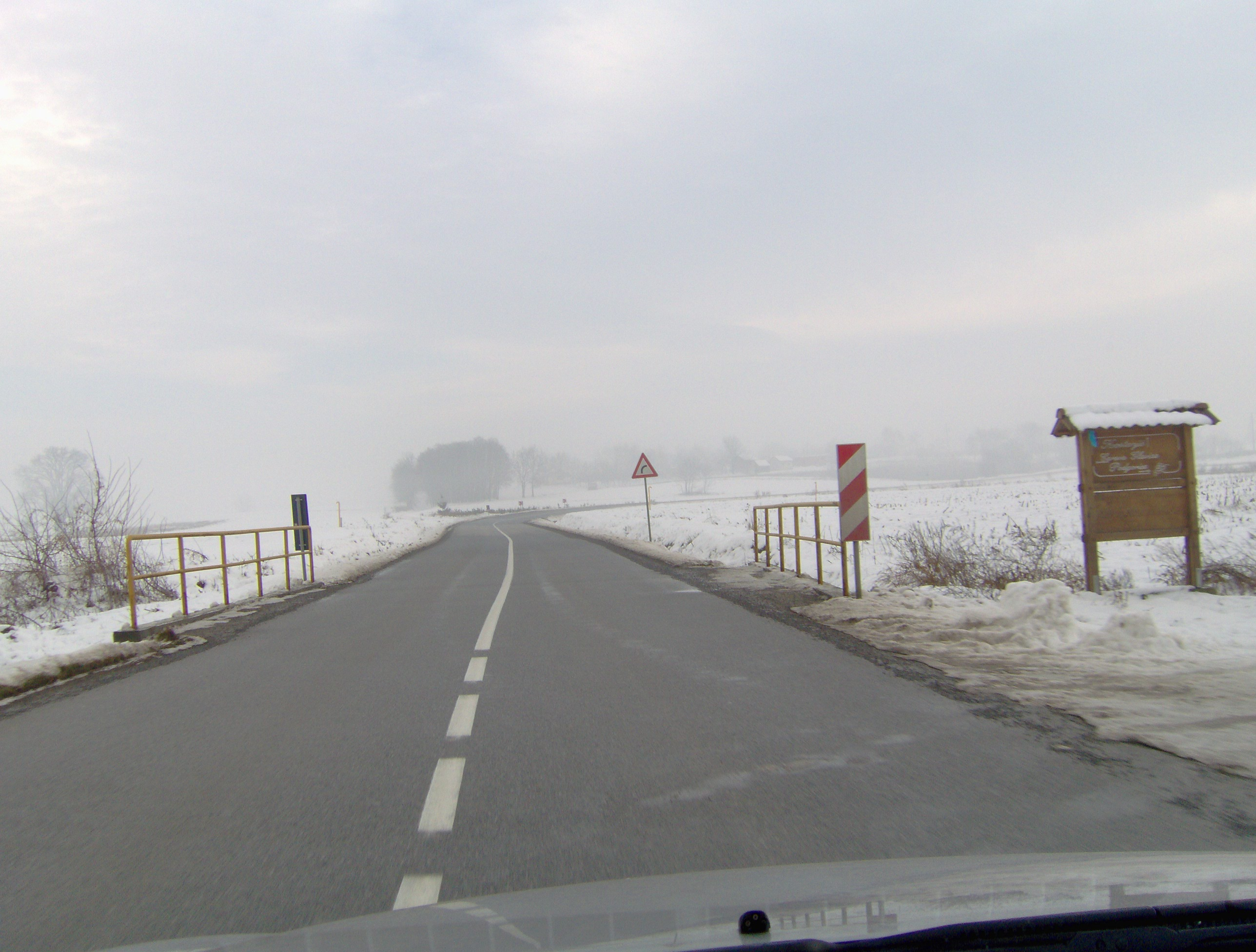 cesta ferdinandovac-đurđevac